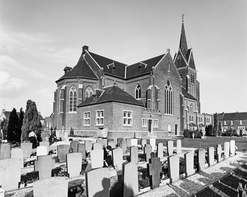 Rooms-Katholieke Kerk: exterieur noord-oost gevel